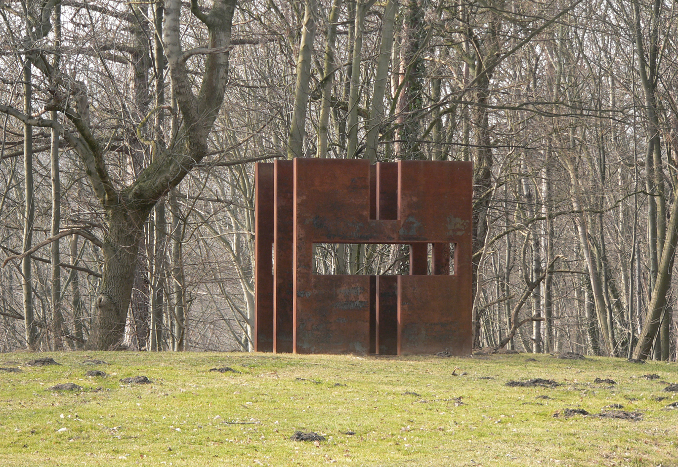 Skulpturenpark in Liebenburg, Skulptur Dreischeibenkreuz